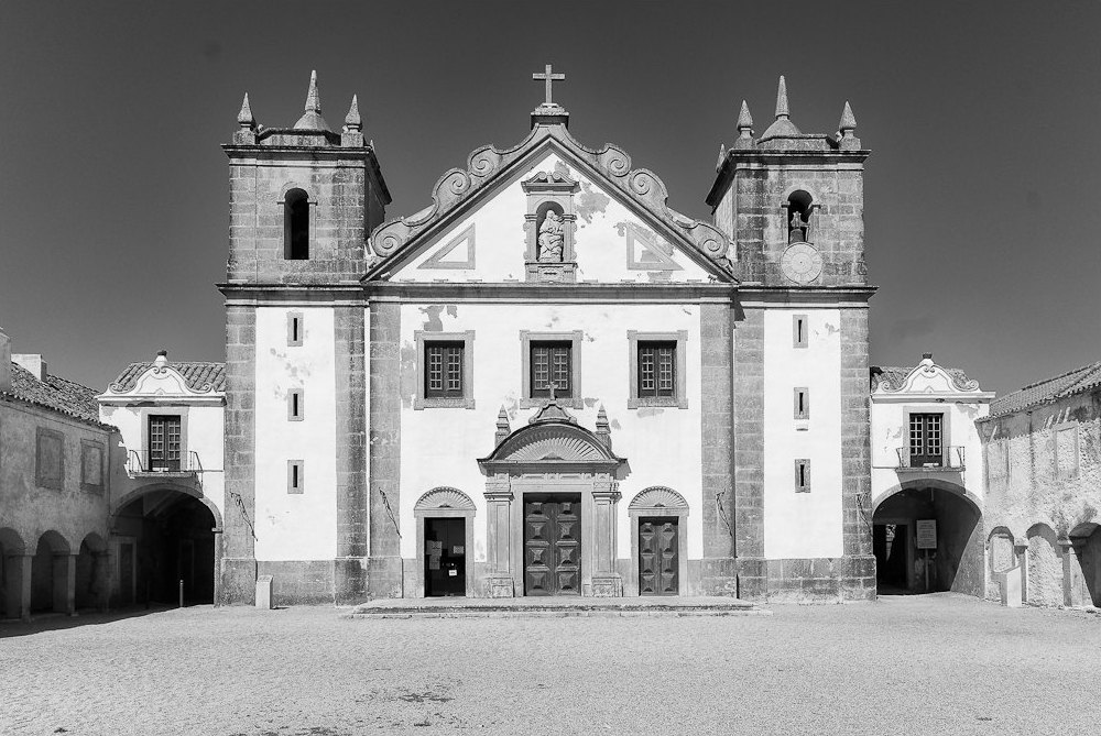 Portugal